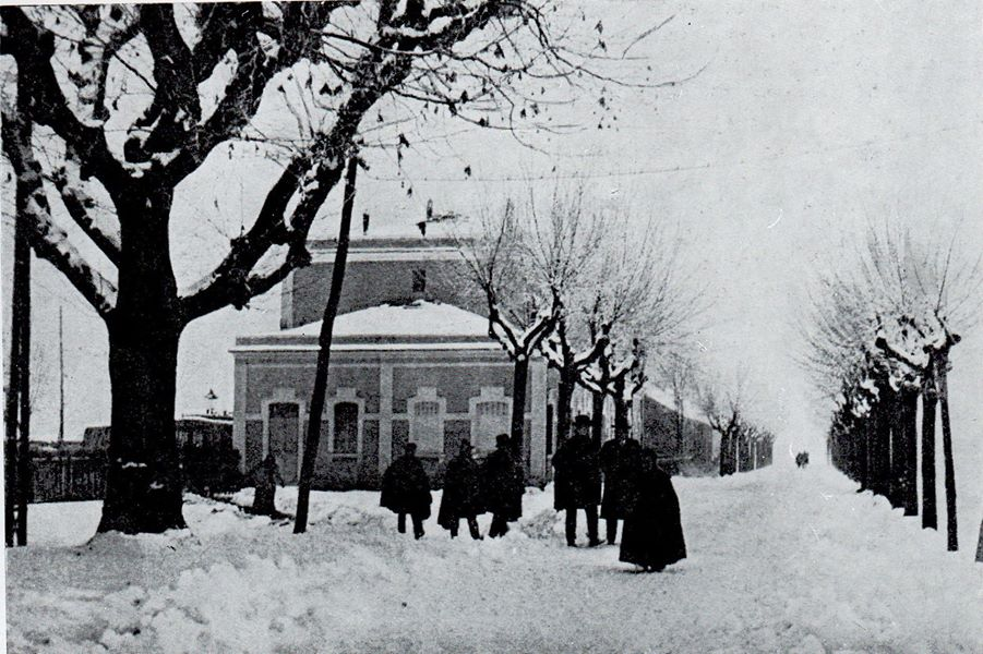 Stazione tramviaria di Mantova Borgo Te, della BS-MN-Ostiglia, in una giornata di neve